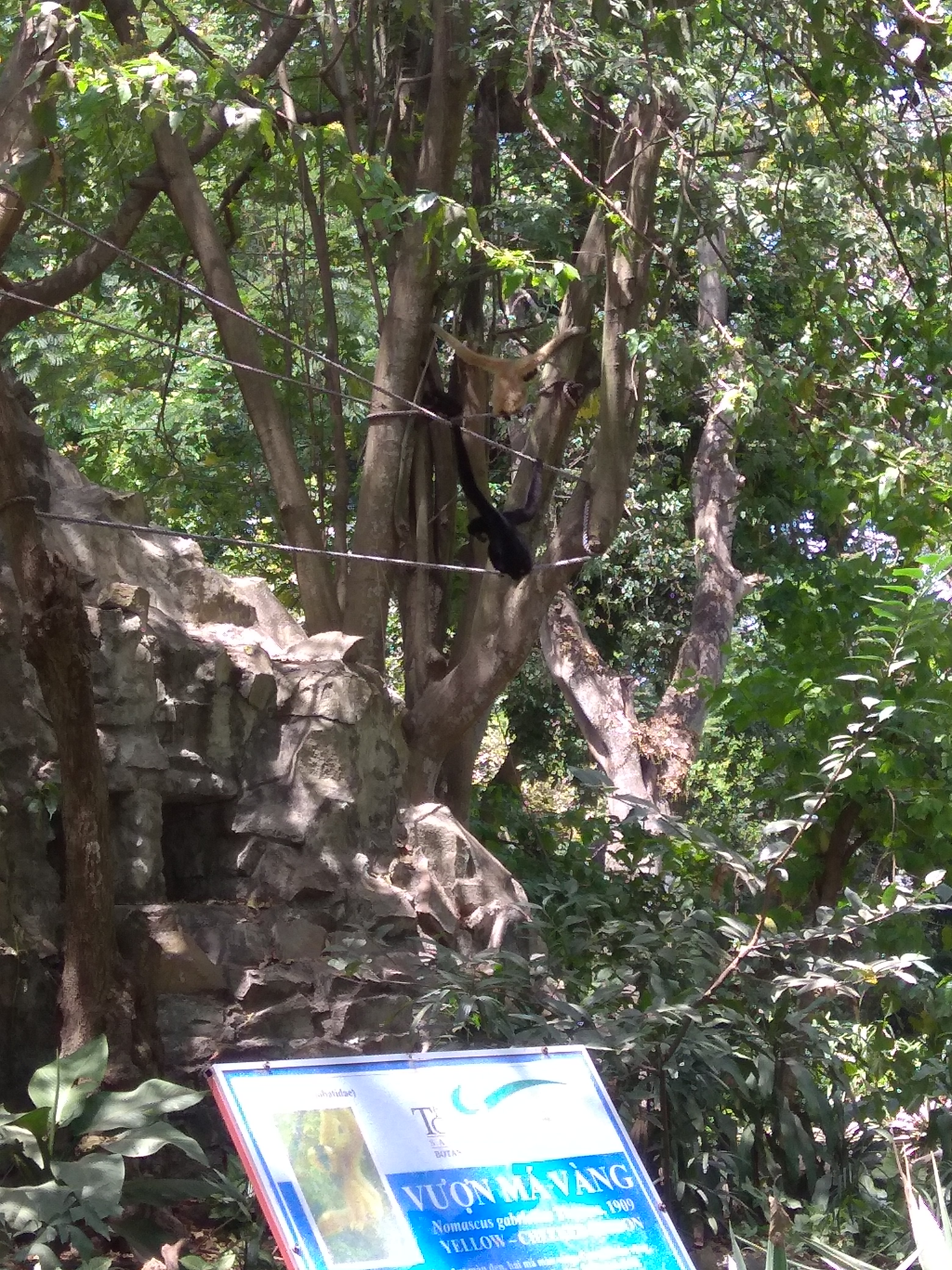 黃頰長臂猿在越南西貢動物園